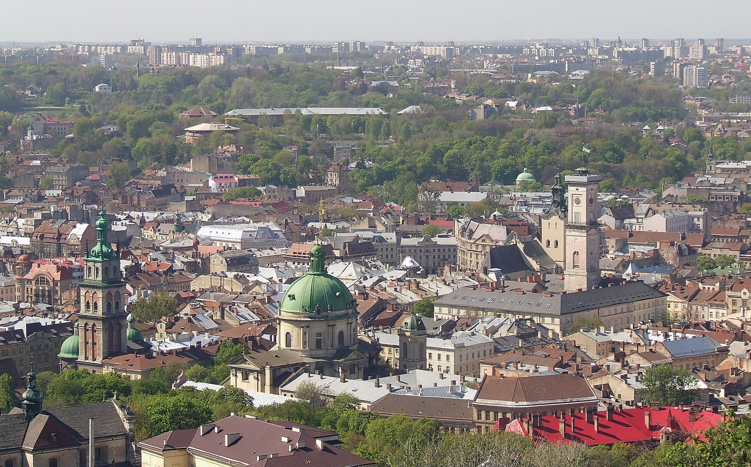 Zdjęcie Starego Miasta we Lwowie zrobione ze wzgórza "Wysoki Zamek"